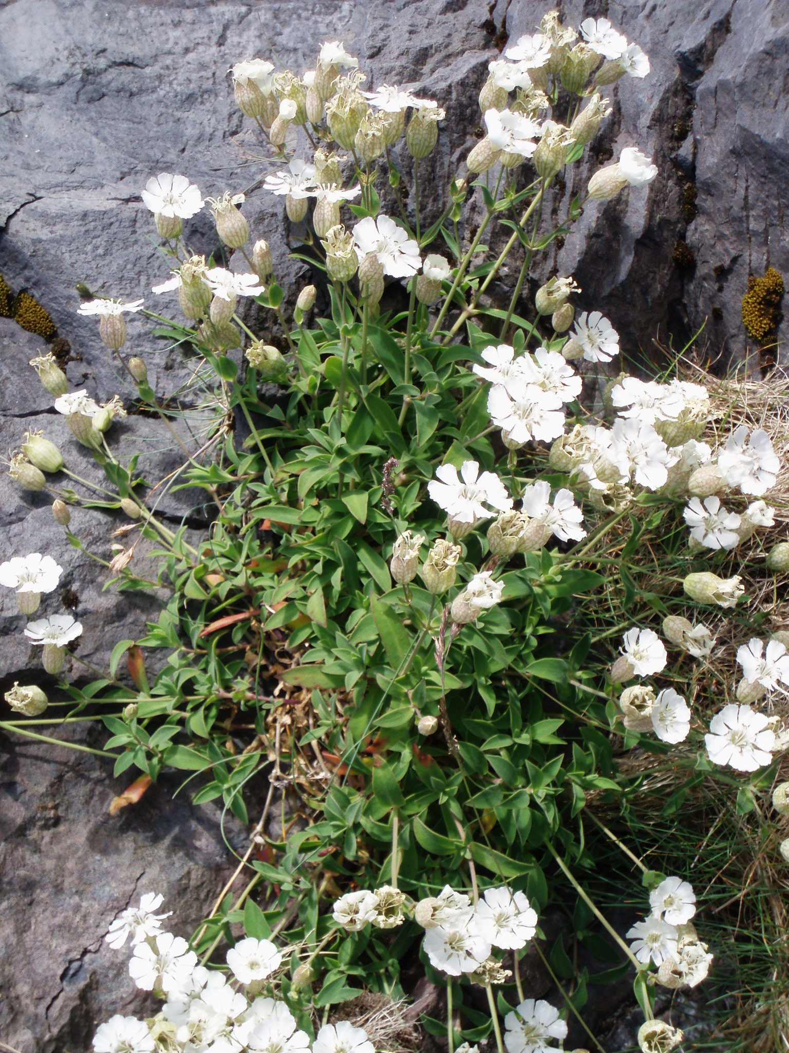 Silene uniflora (Klippen-Leimkraut) in Iceland